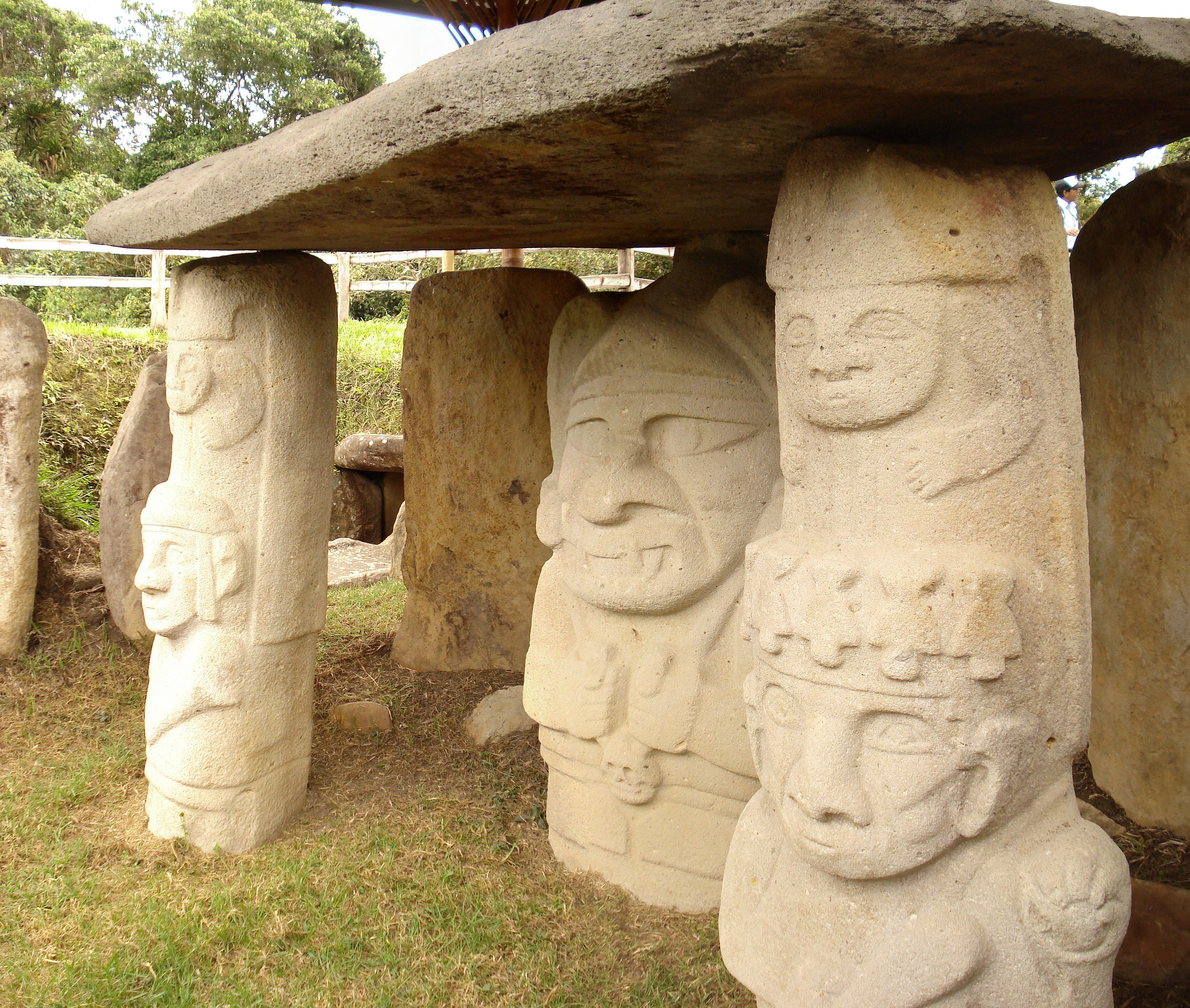 Idolos_san_agustin_sacerdote